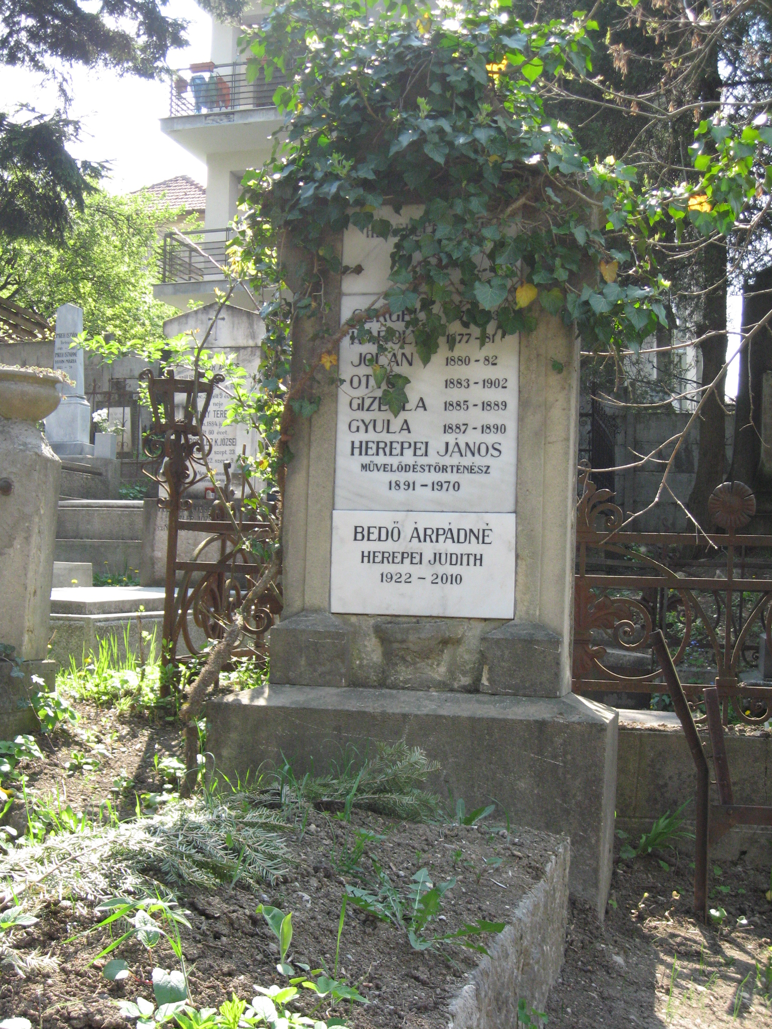 Herepei János sírja a kolozsvári Házsongárdi temetőben.